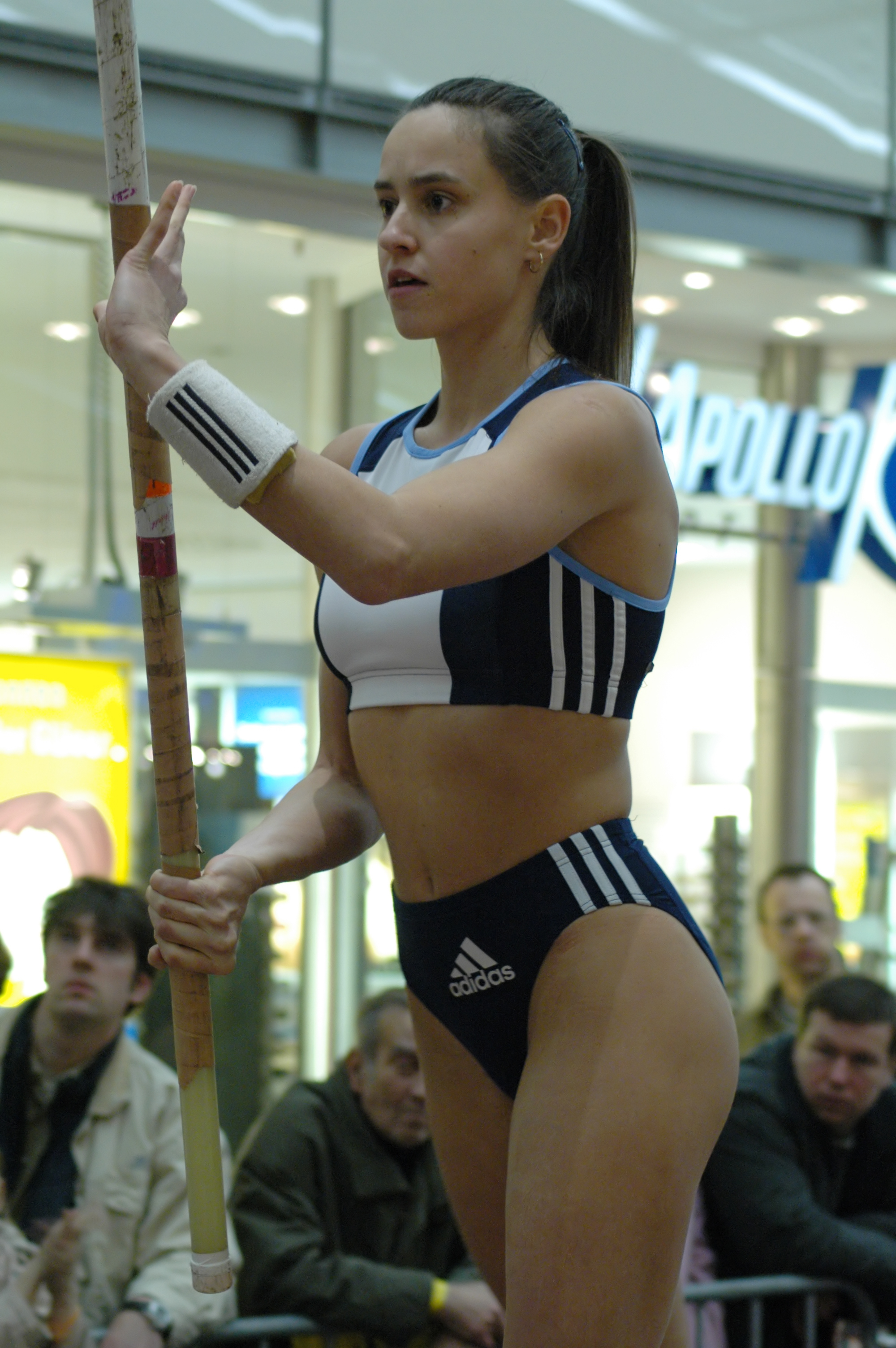 Szusa Szabo beim internationalen Stabhochsprungmeeting 2005 im Sterncenter Potsdam Autor: Frank Wagner Pole Vault